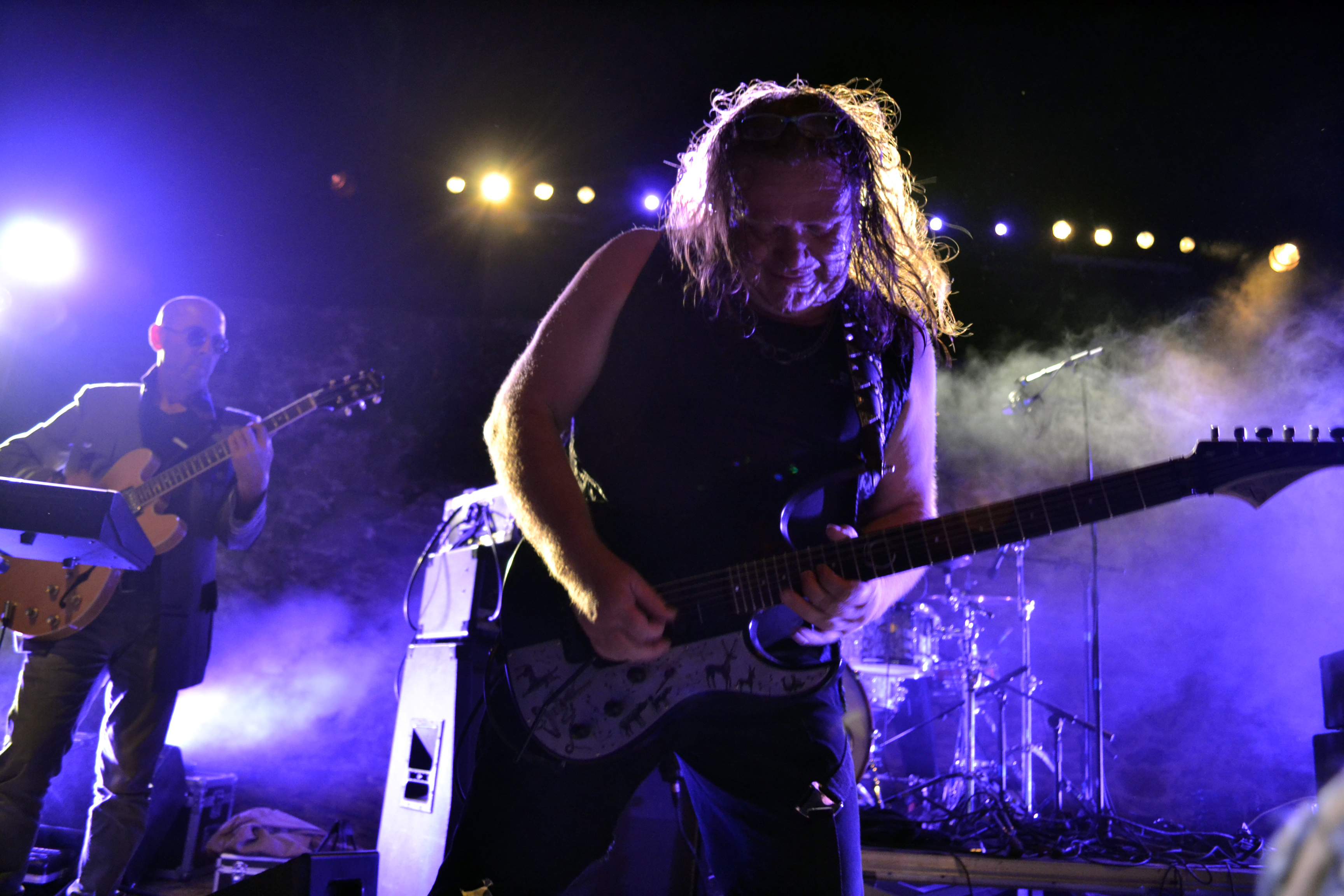 Pat O’May en concert au fort du Dellec, à Plouzané, le 10 juillet 2015.